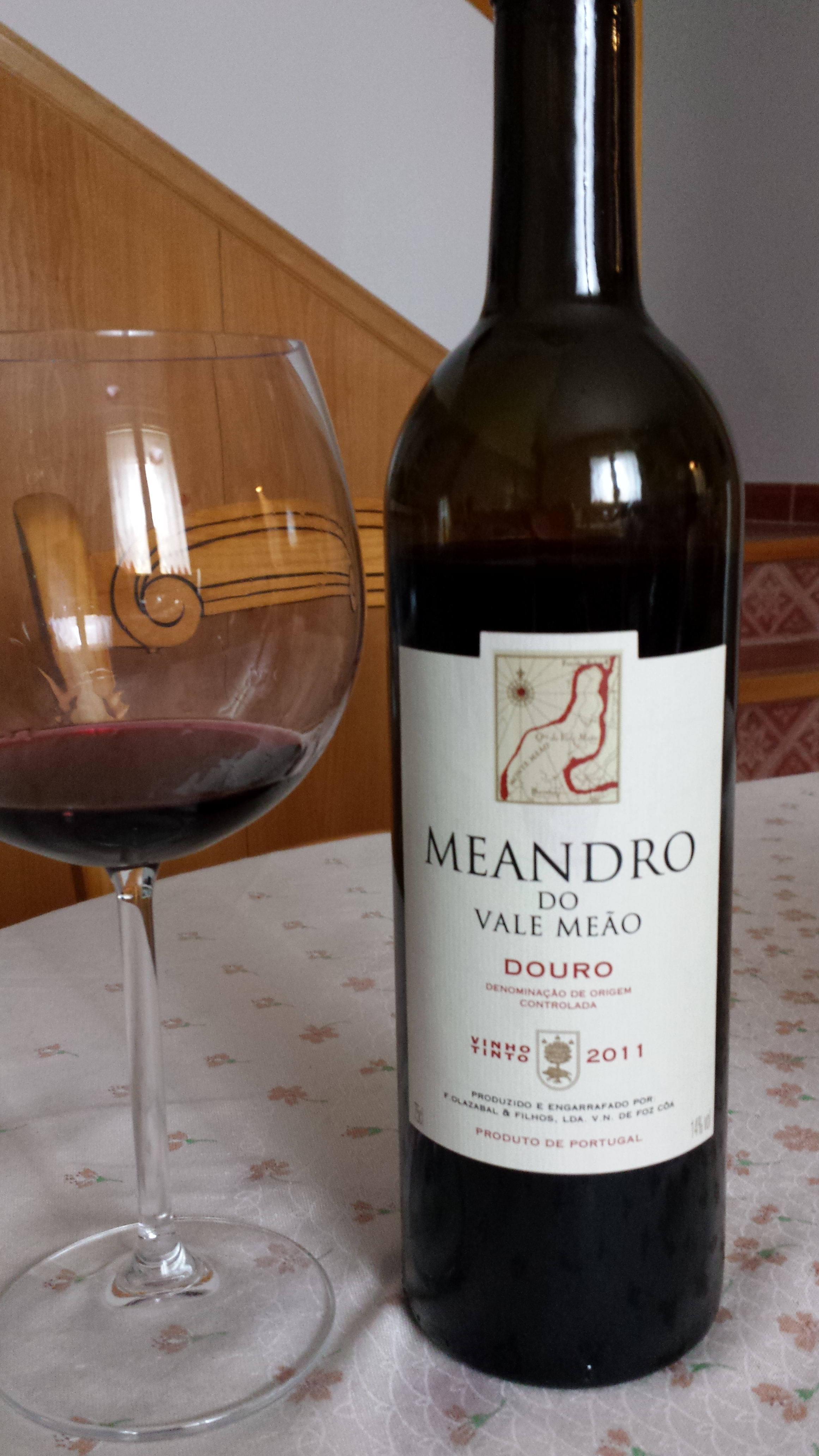 Vino del Douro. Portugal.